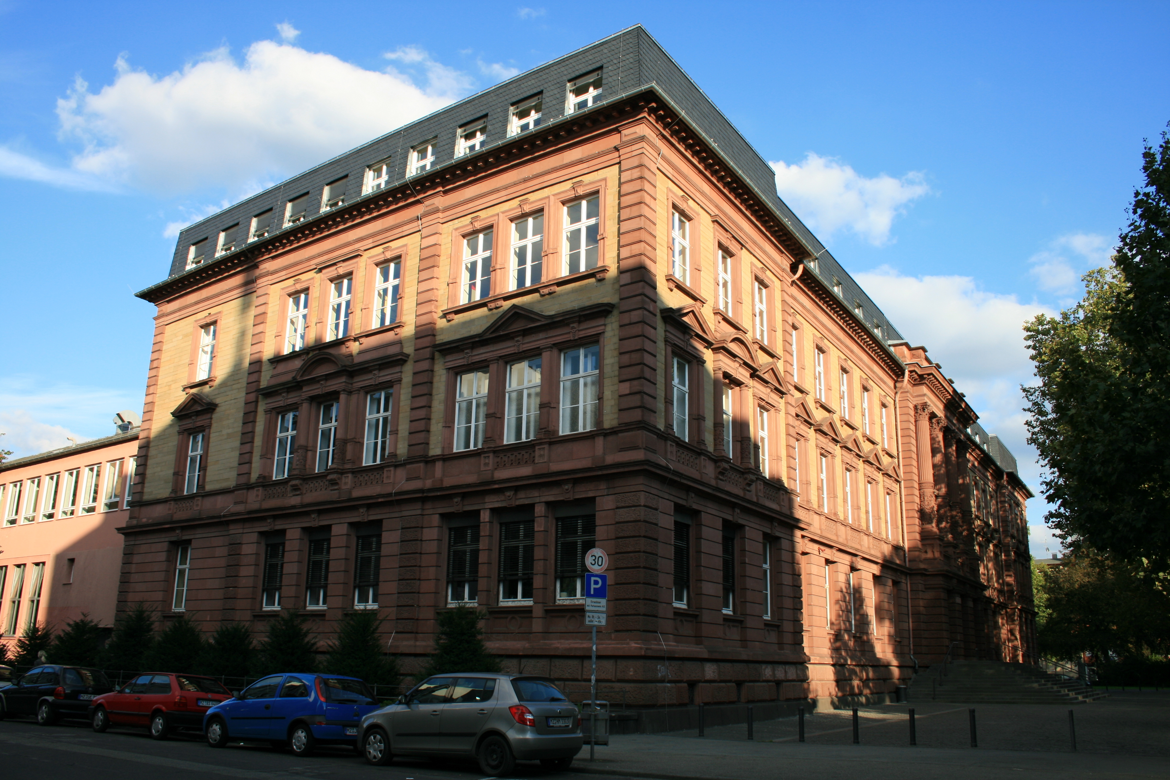 Mainz-Neustadt, 117er Ehrenhof 2 Schulgebäude des Rabanus-Maurus-Gymnasiums; schlossartige neubarocke Dreiflügelanlage, 1886–89 nach Plänen des Großherzoglichen Kreisbauamtes